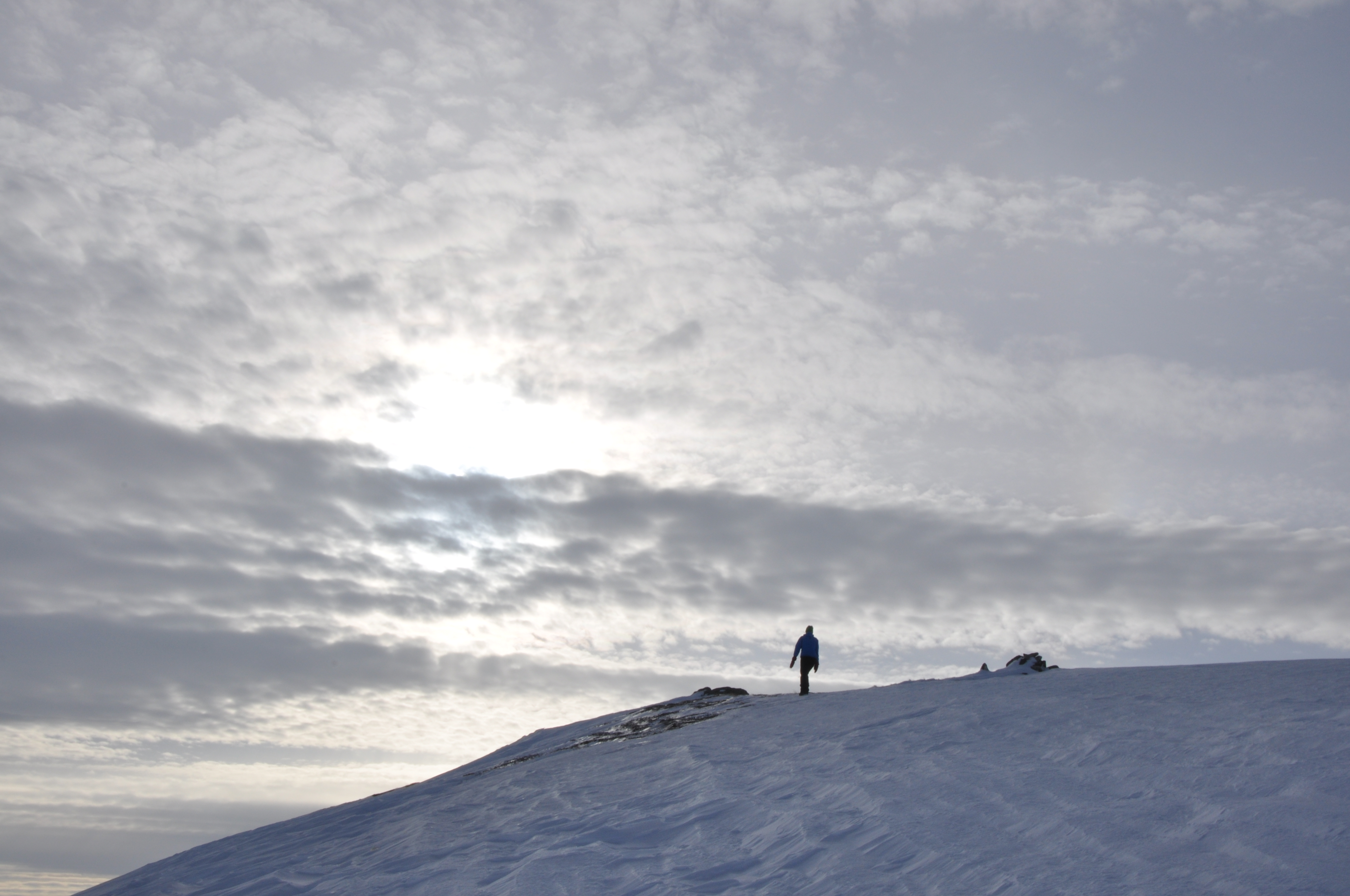 Reineskarvet i påsken